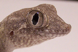 Agamura persica nasal scales